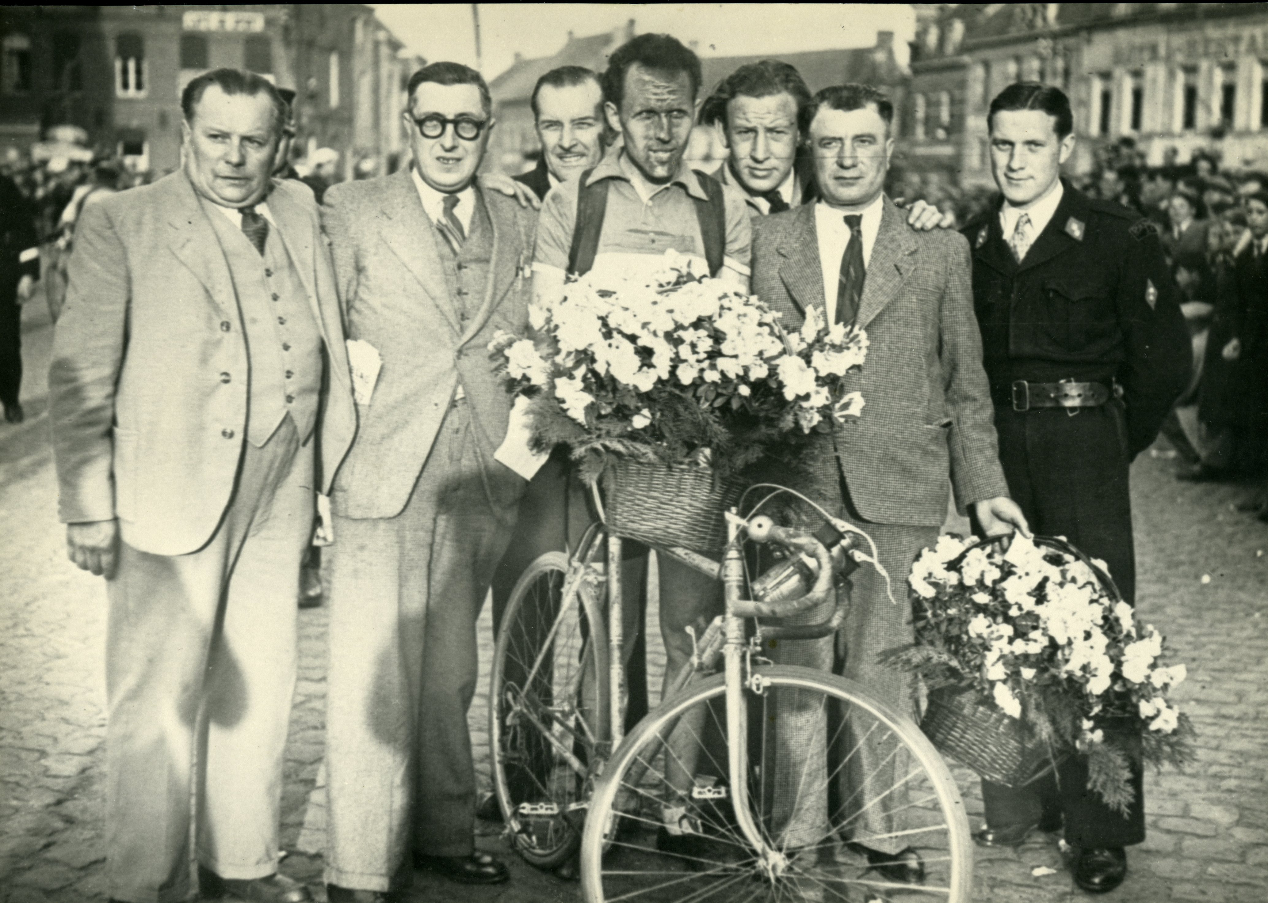 Op de Markt in Waregem wint Maurice Desimpelaere de tweede etappe van Dwars door België 1946. Hij wordt meteen ook eindwinnaar. Voor het tweedaagse concept inspireerde het bestuur van Waregem Vooruit zich volgens een wedstrijdbrochure uit die periode op de tweedaagse rittenkoers Parijs – Saint-Etienne. Deze Franse wedstrijd werd verreden tussen 1921 en 1962, weliswaar met de nodige onderbrekingen. Renners legden de afstand tussen Parijs en Saint-Etienne ─ in vogelvlucht zo’n 460 kilometer ─ af in twee dagen en hielden halt in Nevers of Vichy.